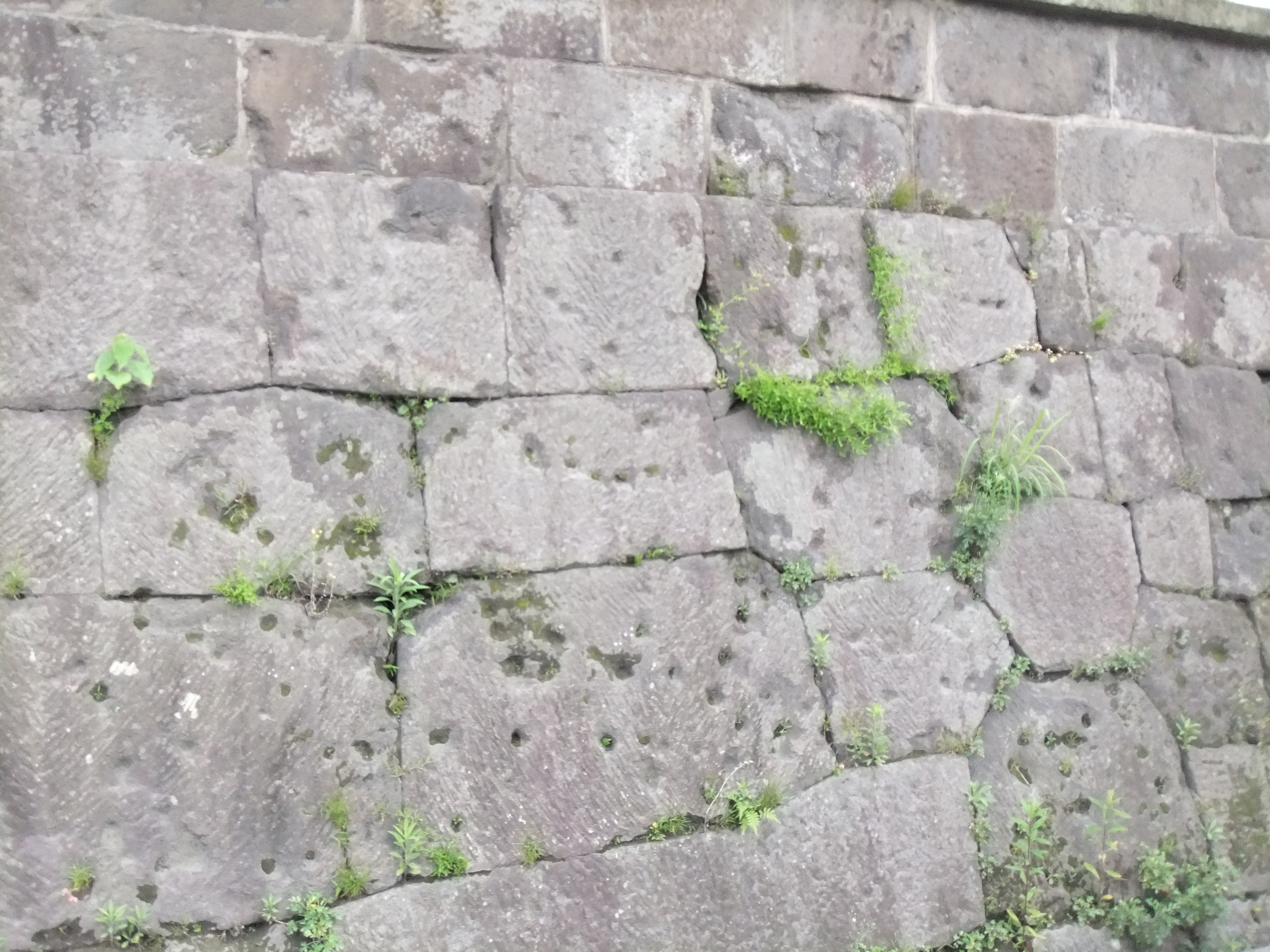 鶴丸城（鹿児島城）城壁 明治戦役弾痕